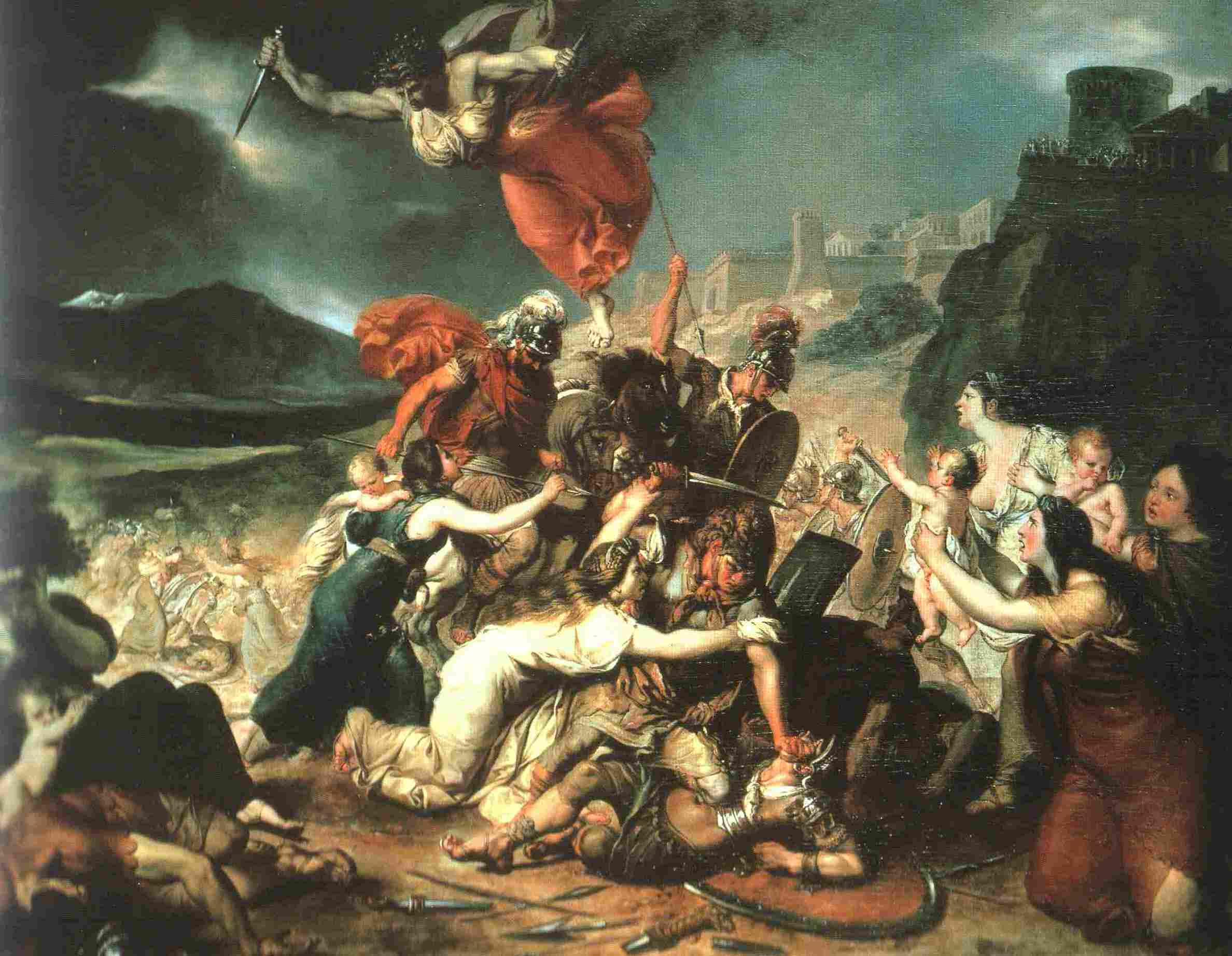 Battaglia tra i Romani e i Sabini interrotta dalle Sabine, olio su tela di Julien de Parme. Fondazione Magnani-Rocca, Mamiano di Traversetolo (Parma).